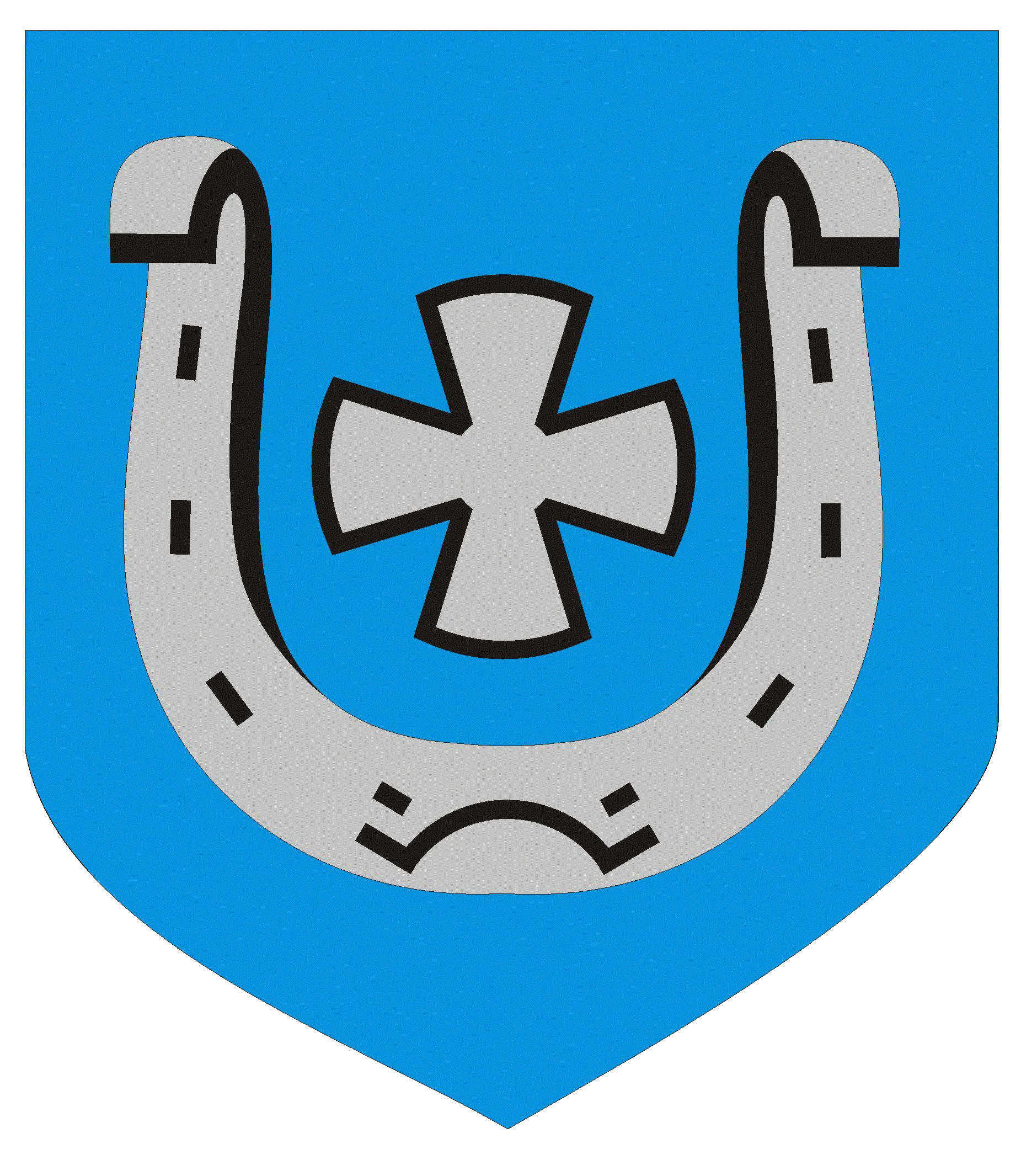 Herb Sędziszowa w poprawnej kolorystyce.